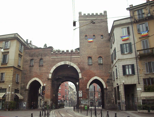 Porta Ticinese a Milano con esposte bandiere della pace nel 2003.